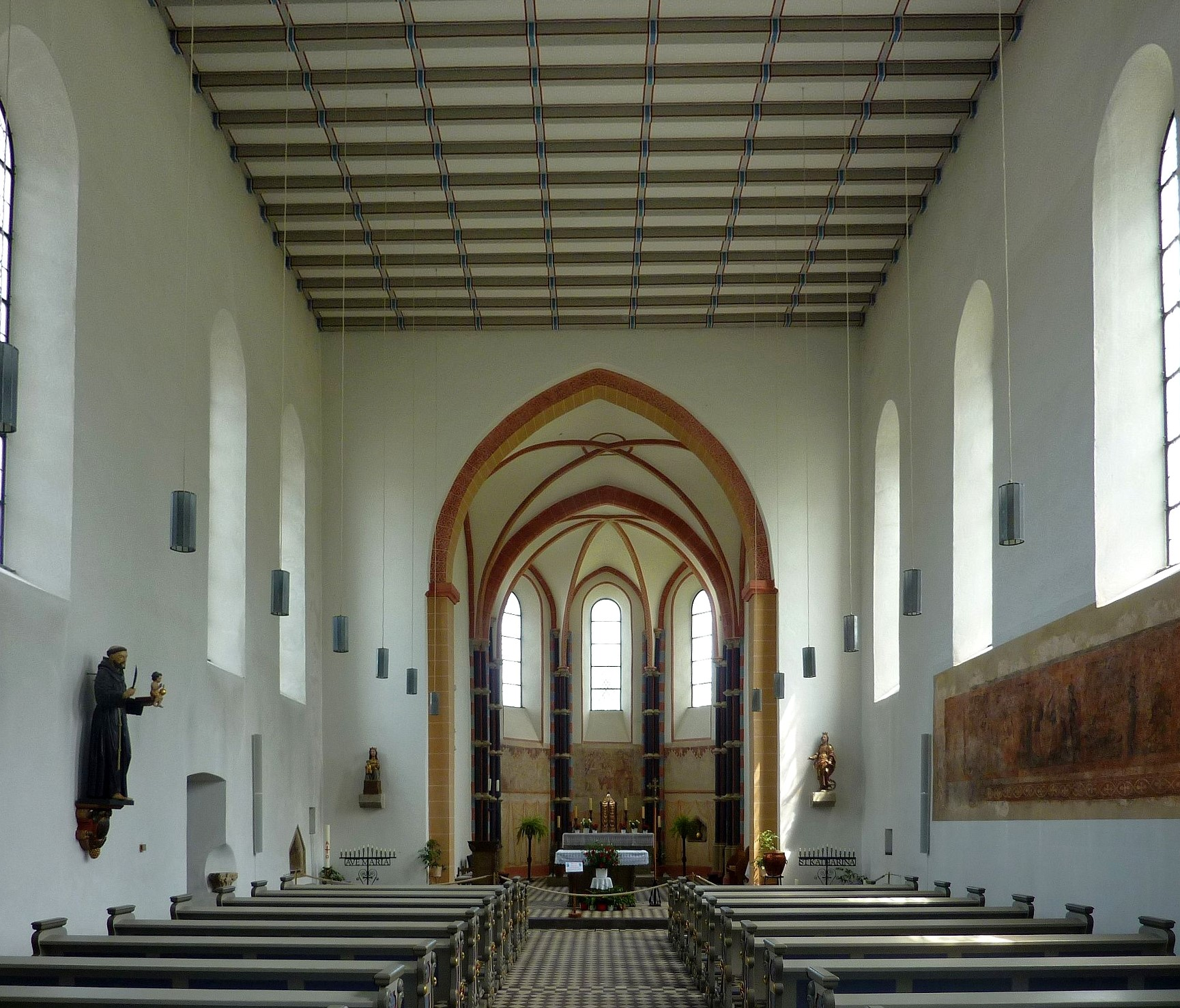 St. Katharina (Stadt Blankenberg)